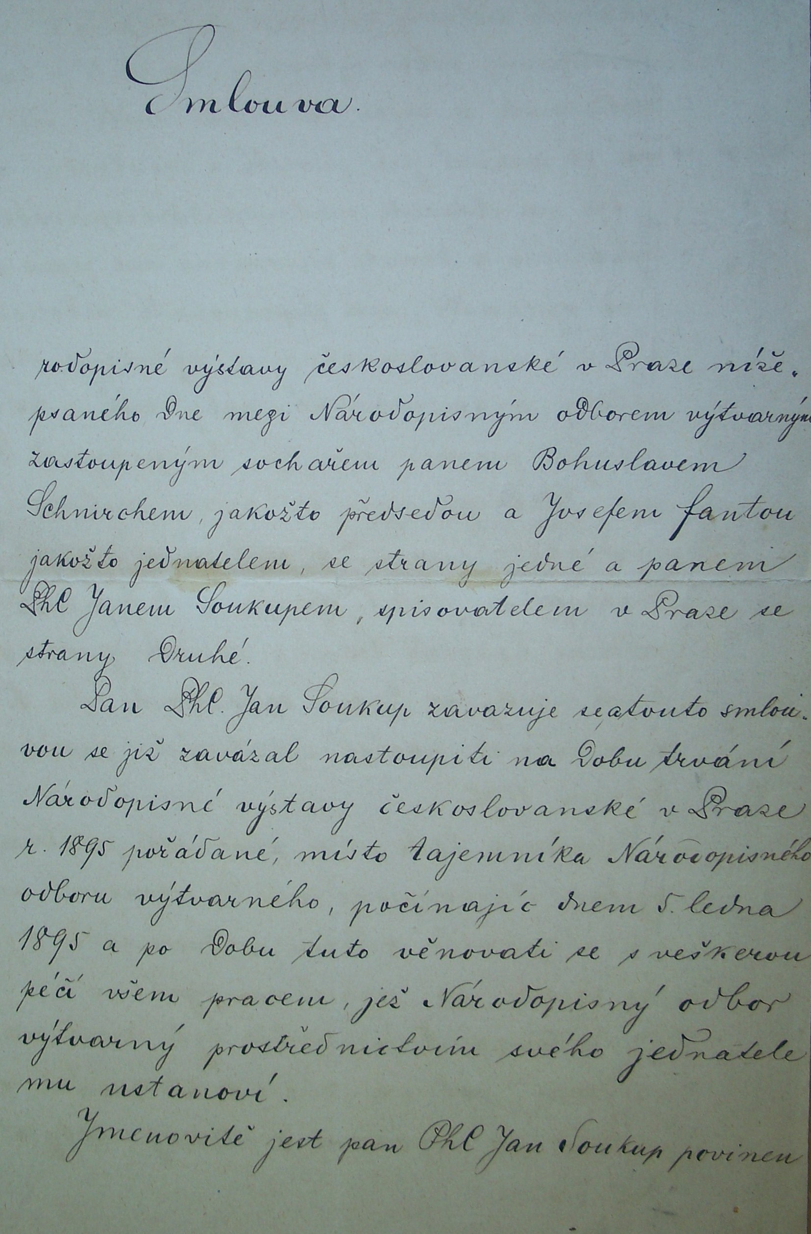 Jan Soukup - opis smlouvy mezi Janem Soukupem a Národopisným odborem výtvarným ze dne 5. ledna 1895. Fotografii pořídila Barbora Honzíková dne 01.01.2006 ve Státním Okresním archivu v Rakovníku.